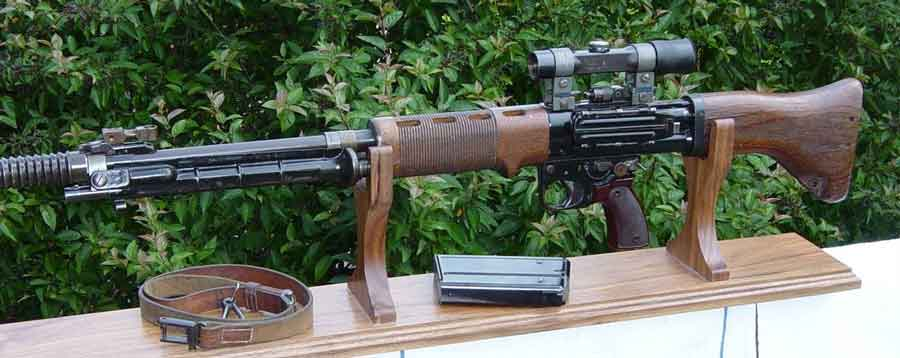 اف جی 42